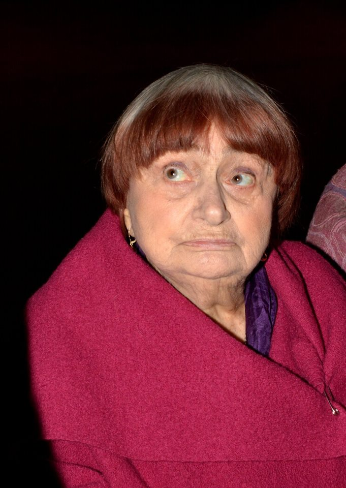 Agnès Varda à la cérémonie des Prix Lumière